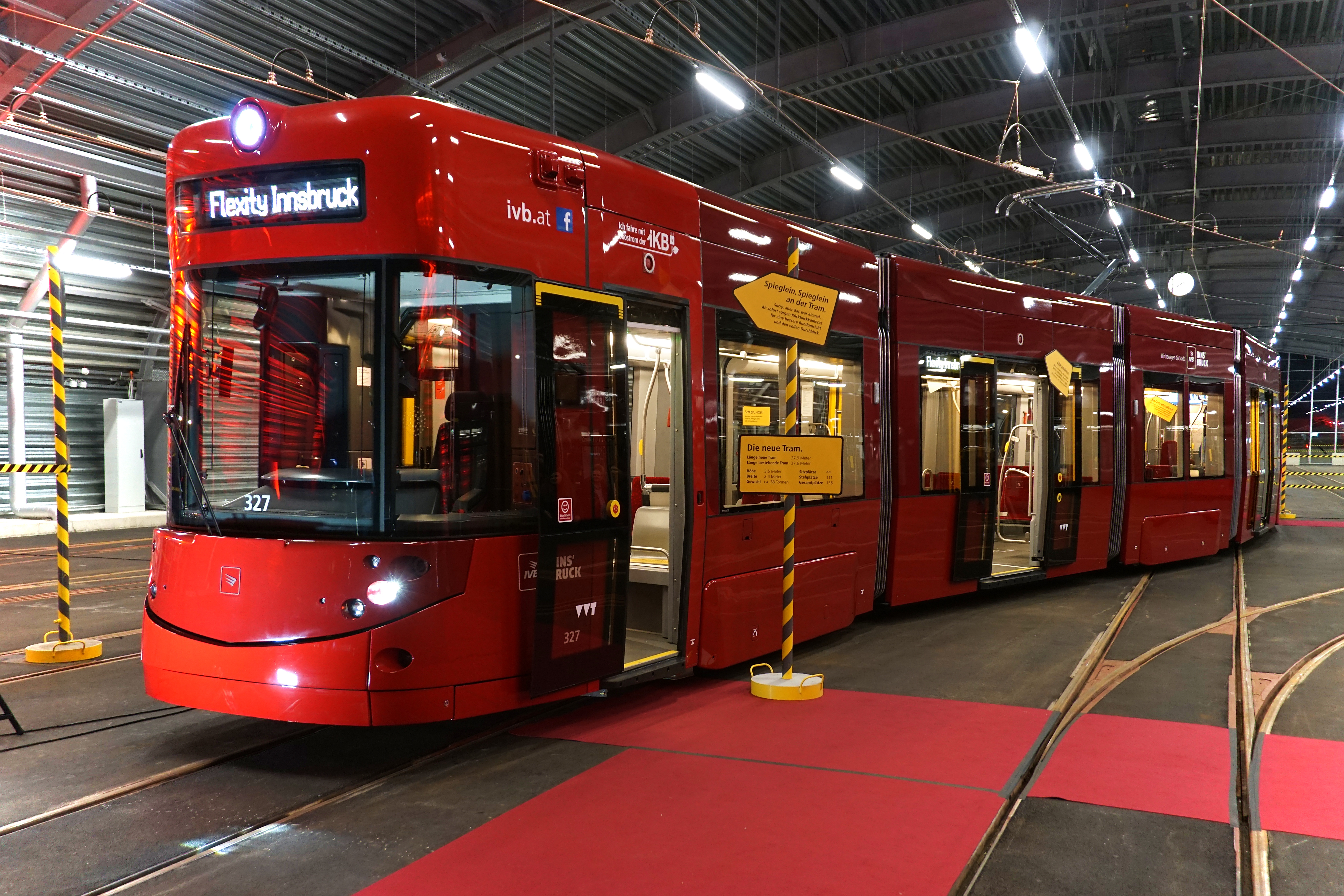 Bombardier Flexity 327 – der erste Flexity der zweiten Generation – der Straßenbahn Innsbruck bei der Präsentation am 2018-03-21